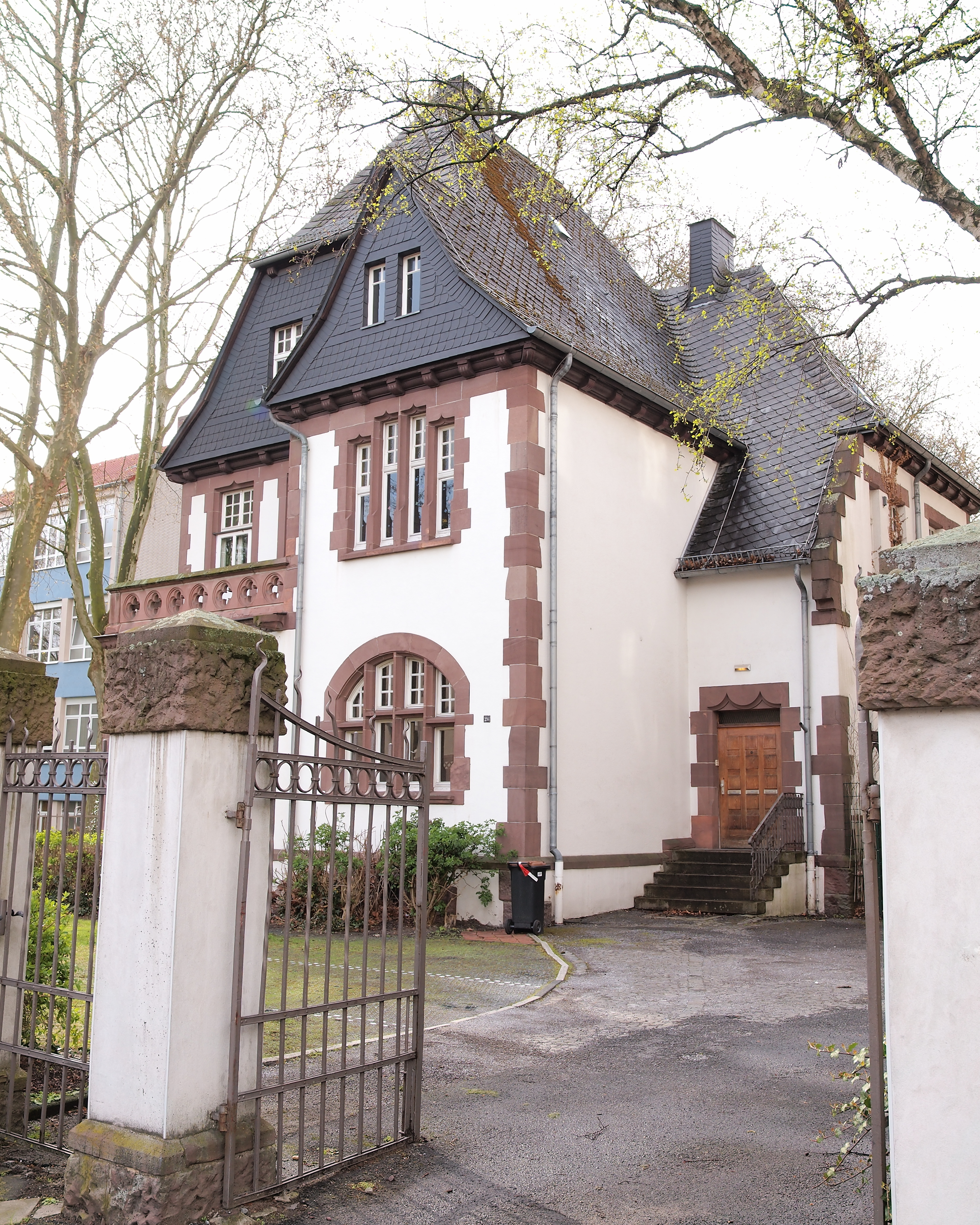 Gebäude des Adalbert-Stifter-Gymnasiums in Castrop, Direktorenvilla, Viktoriastraße 26